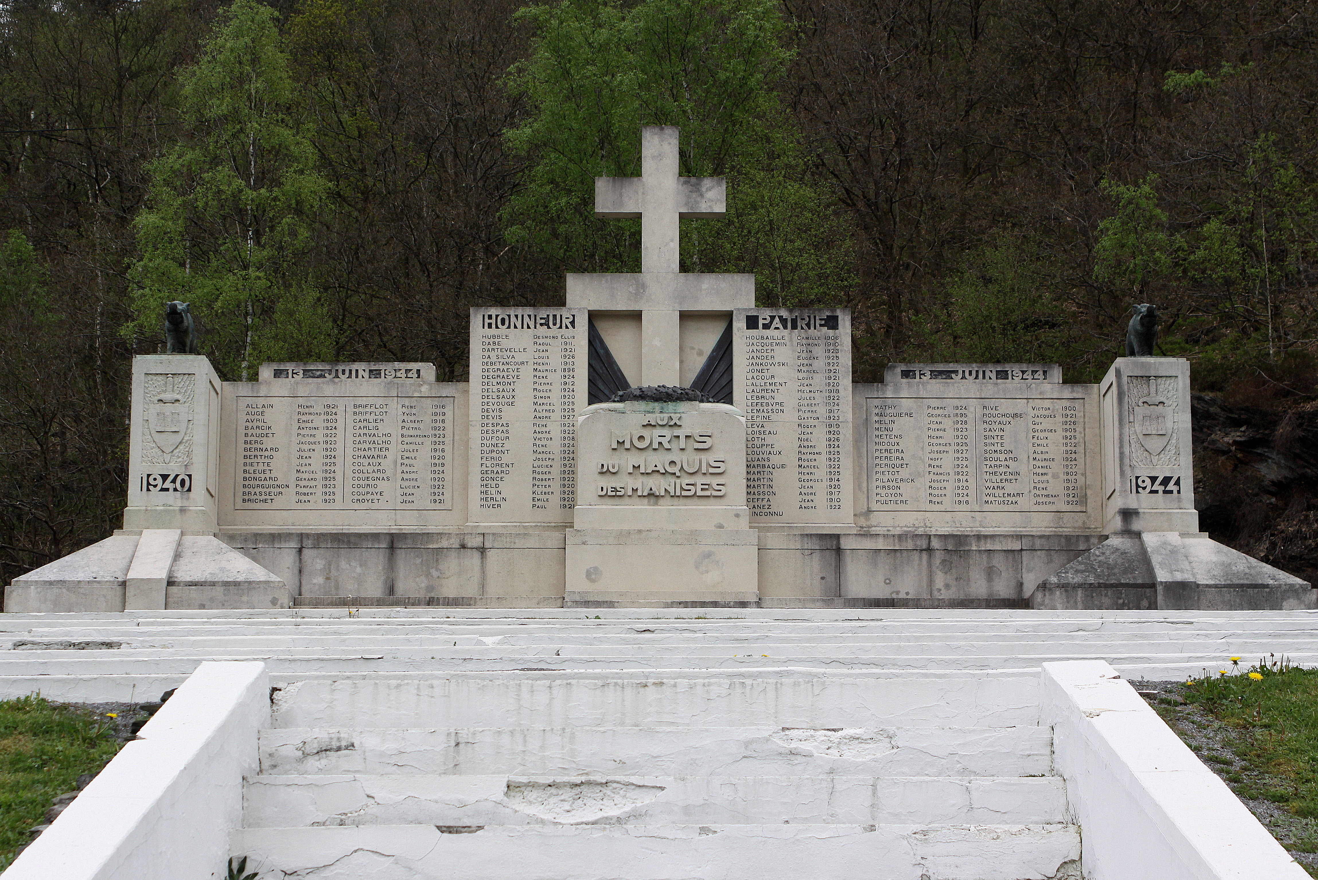 Monument vum Maquis des Manises zu Revin